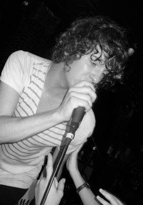 Luke Pritchard , chanteur/guitariste The Kooks, à La Maroquinerie (Paris) 14 juin 2006 -Photo de Sandra CARPENTIER